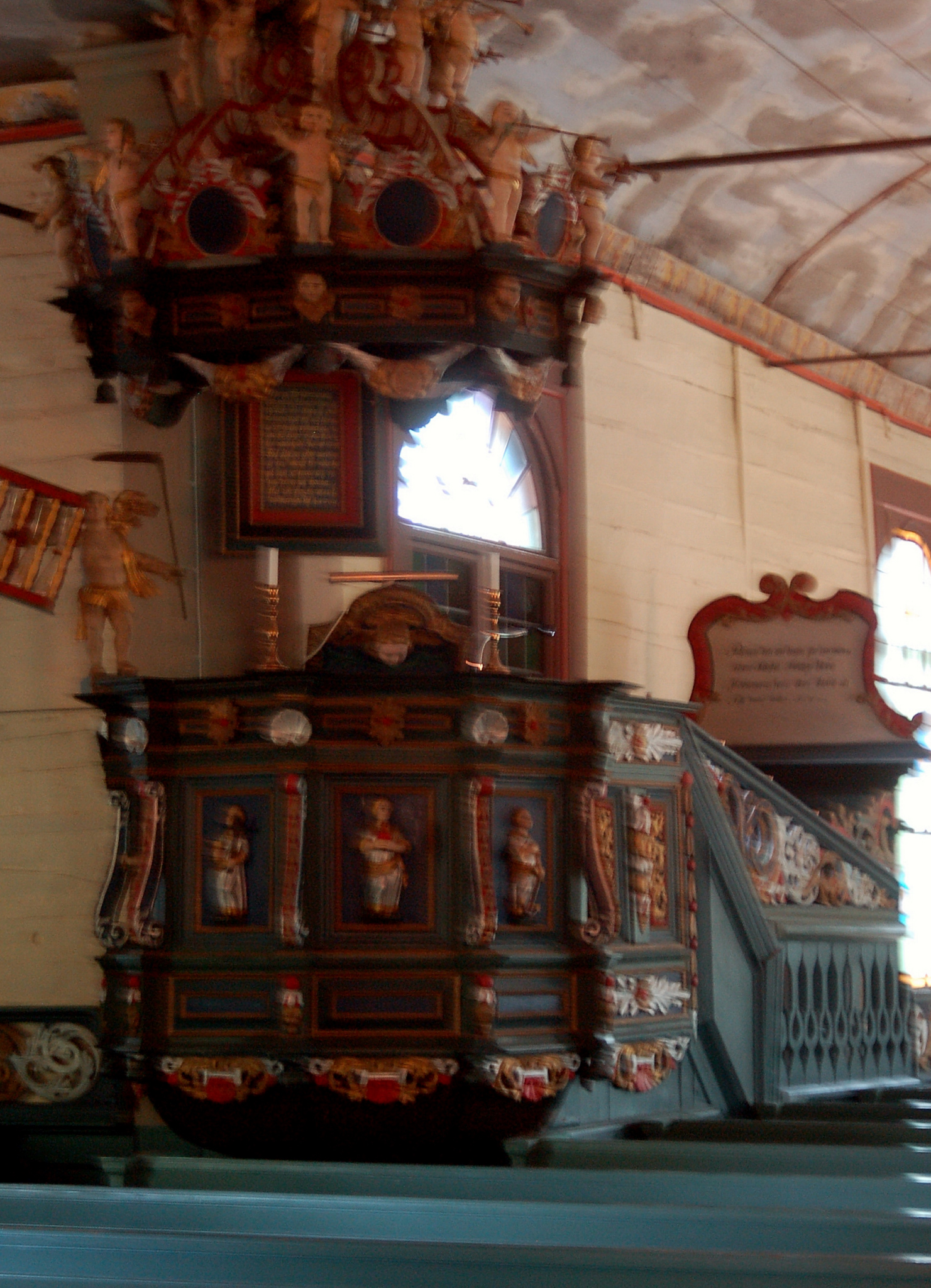 Predikstol i Nysunds kyrka, Åtorp Sweden. Predikstolen tillverkades av Bengt Svensson 1690 och förbättrades av Isak Schullström.